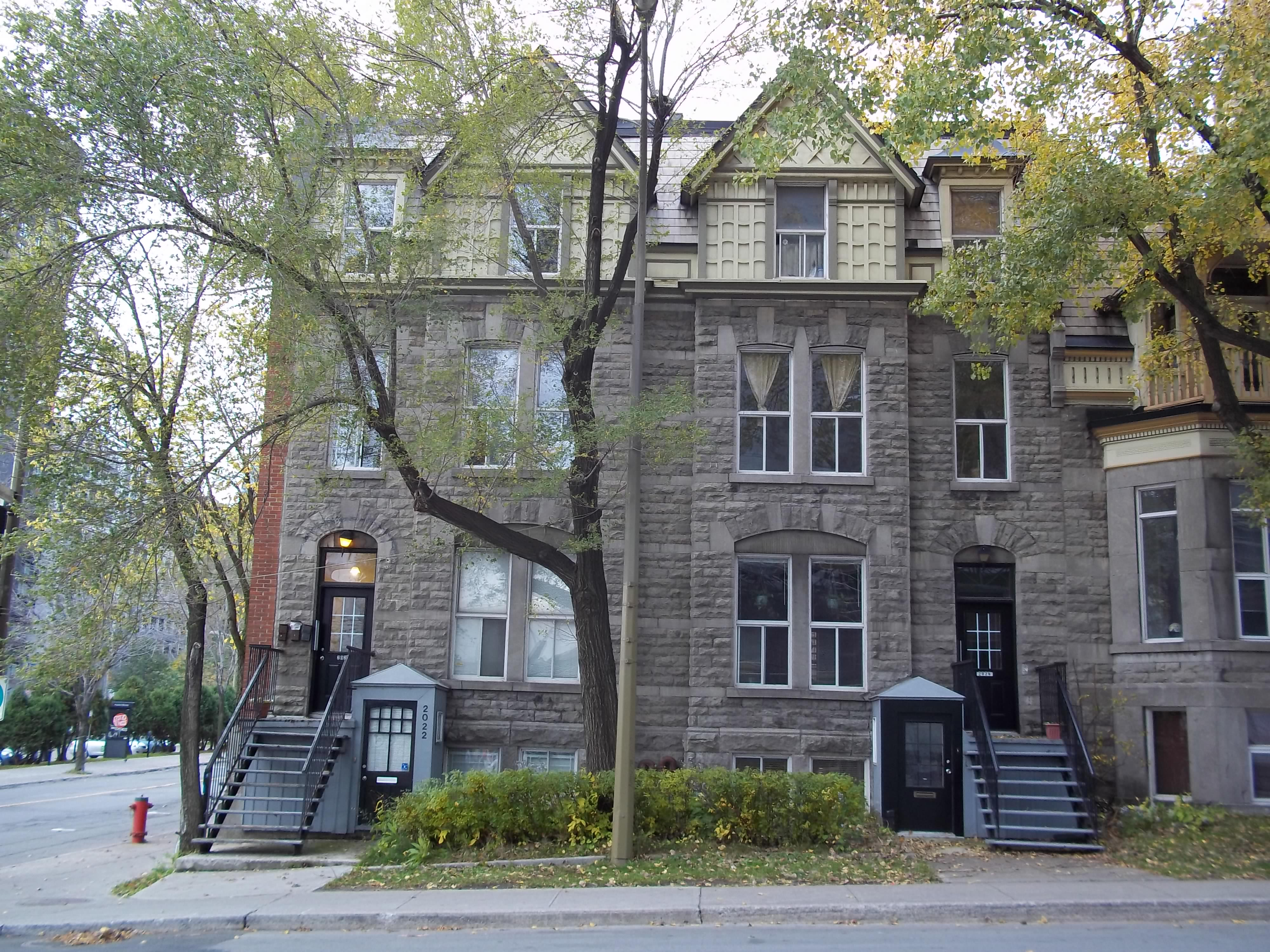 Maisons John-Date, 2022-2024, rue Jeanne-Mance, Montréal